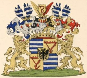 Heydeni suguvõsa krahvivapp